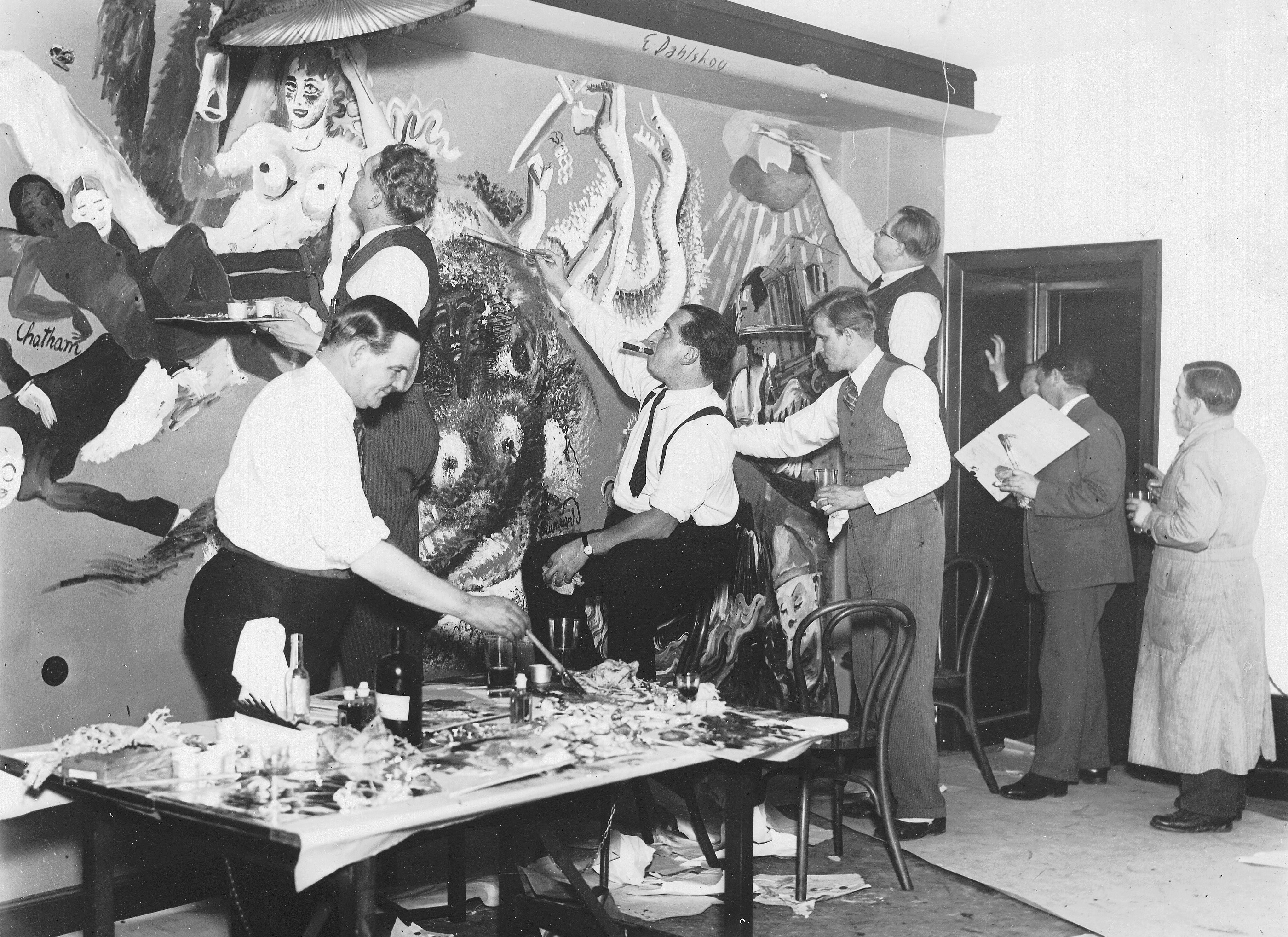 Restaurang KB dekoreras: fr. vä. Jon-And, Gunnar Torhamn, Isaac Grünewald, Jerke (Erik Jerken), Bertel-Nordström och Einar Forseth. Längst ut till höger står arkitekt Björn Hedvall.